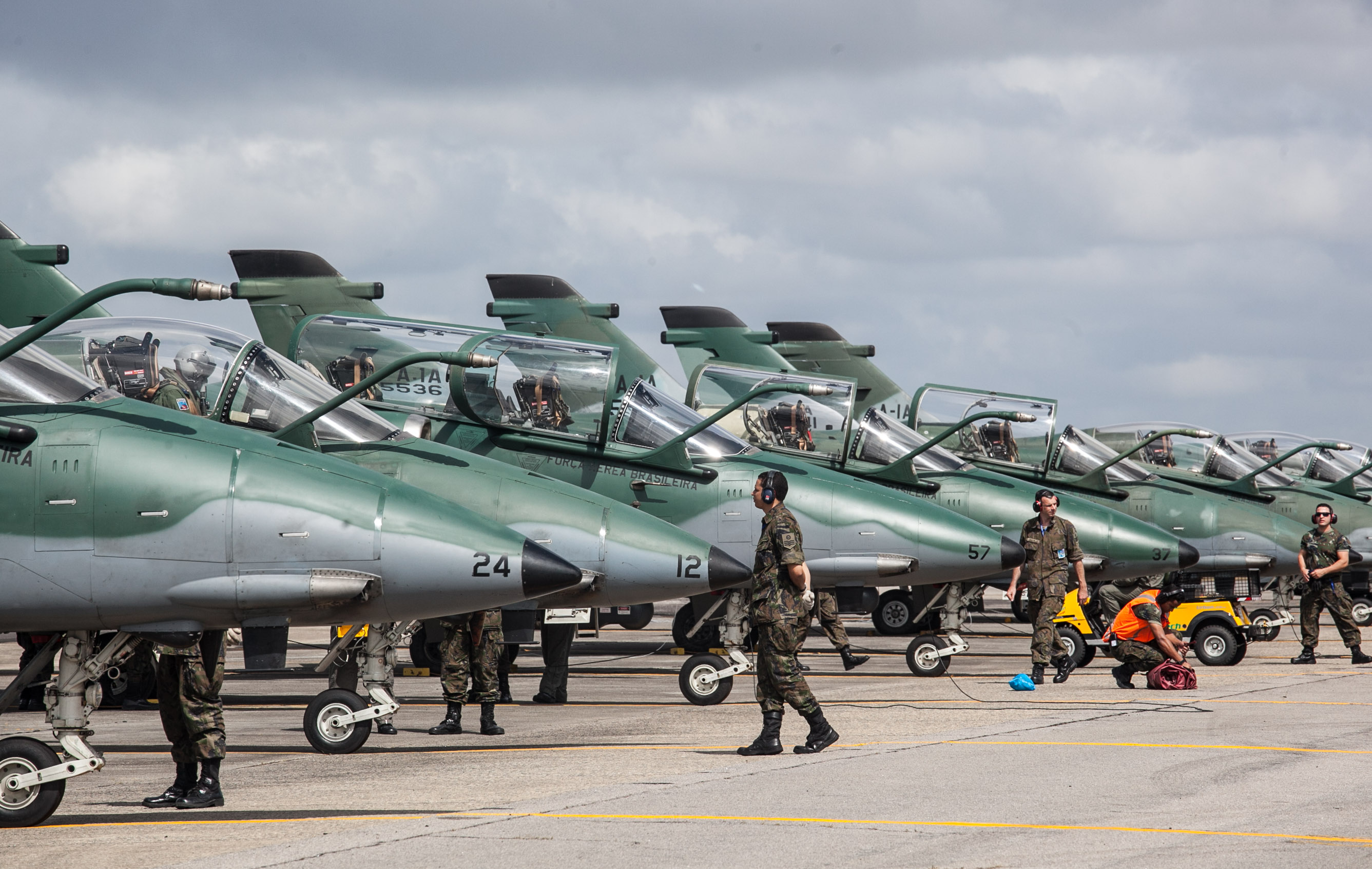 Fotos Felipe Barra/MD